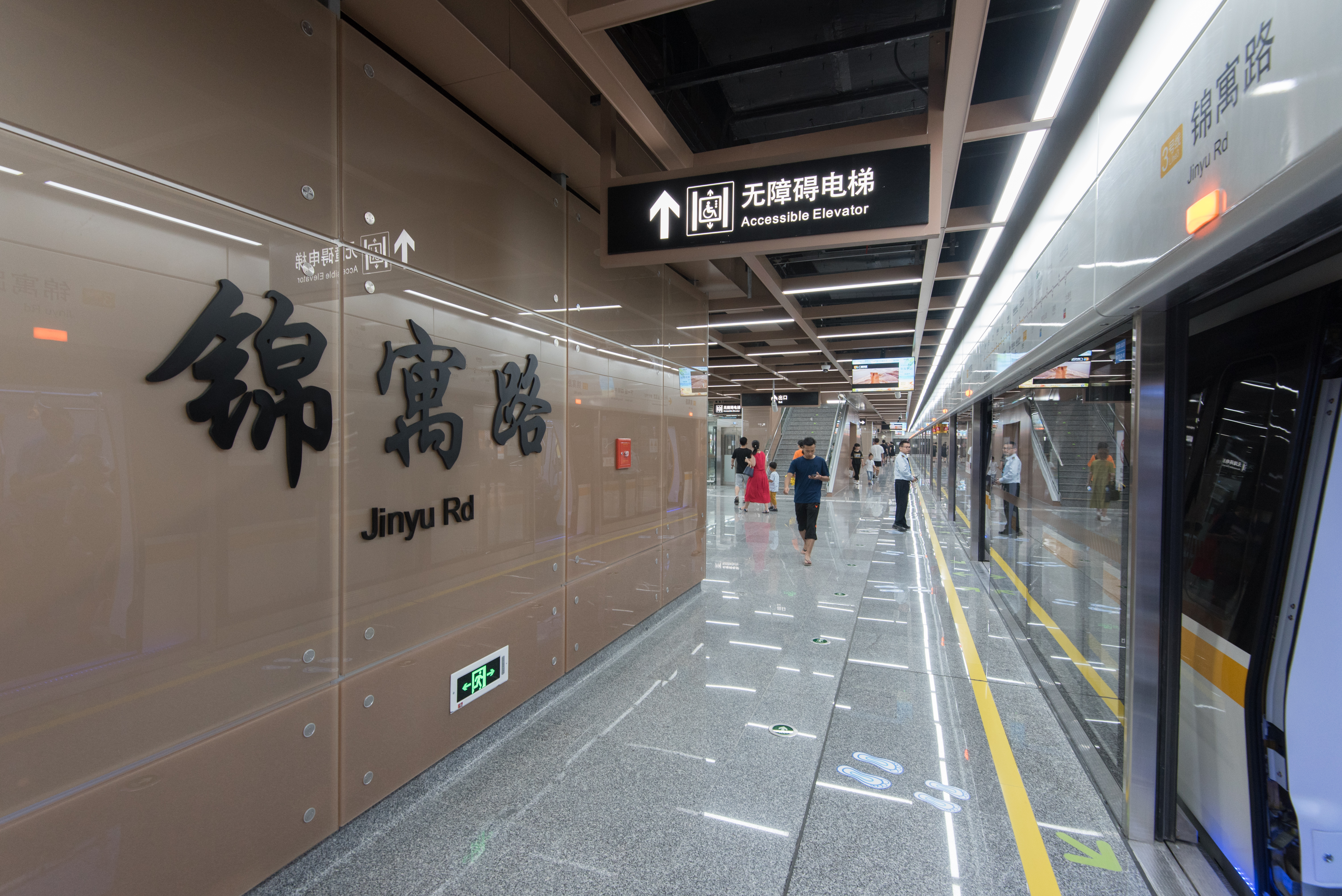 宁波地铁锦寓路站